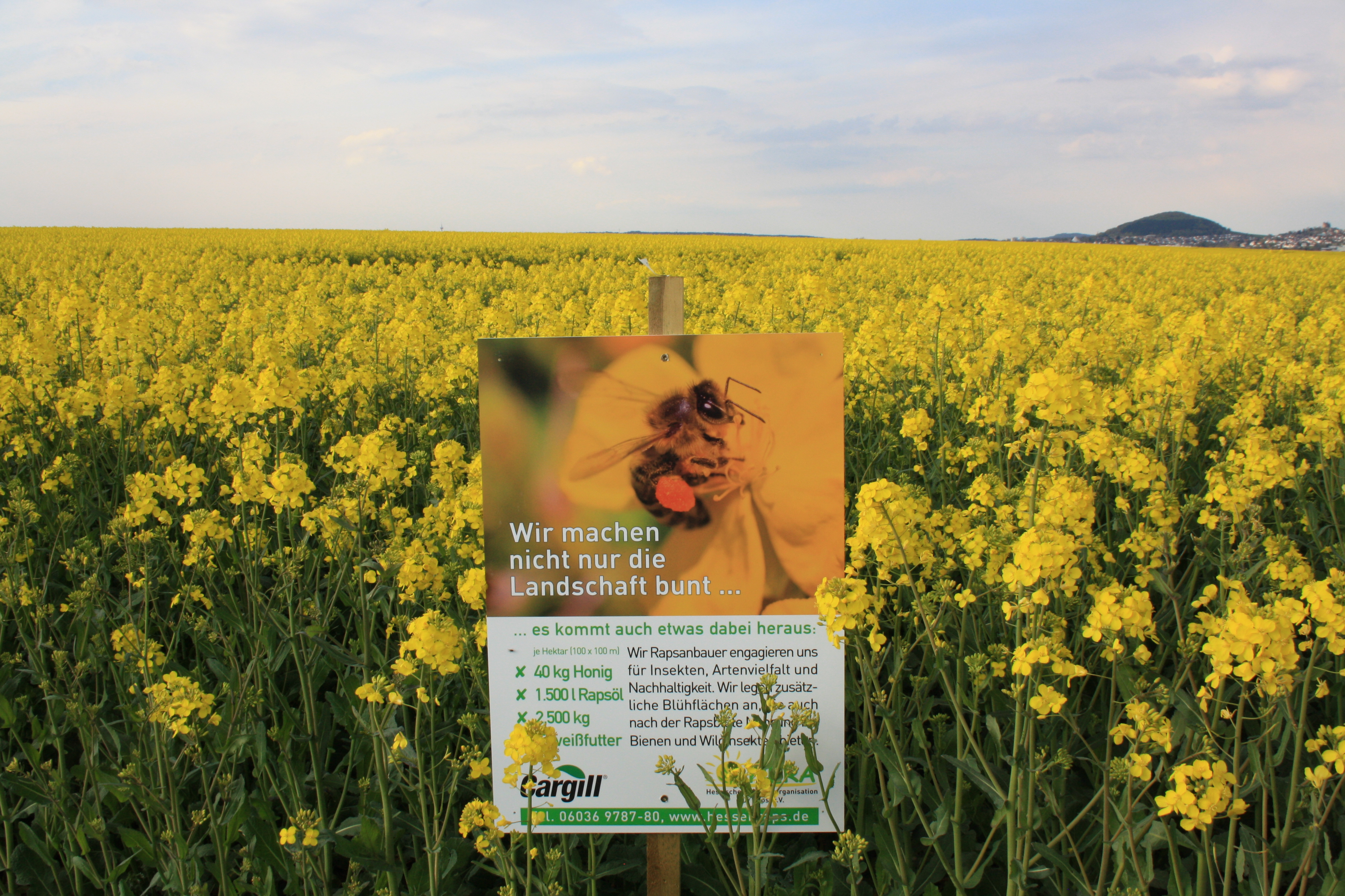 Rapsfeld bei Fulda Johannesberg